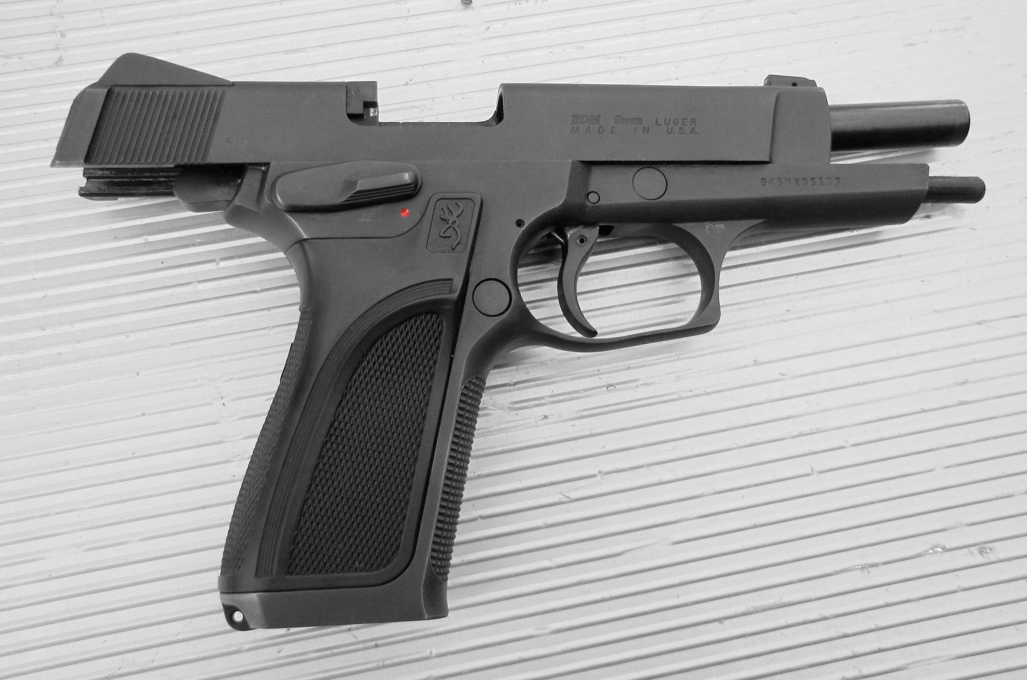 Pistolet semi automatique Browning BDM